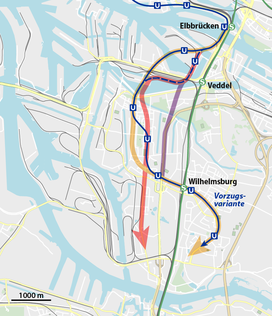 Planungen der U-Bahn-Linie 4 in Hamburg: dunkelblau, dünne Linie: Vorzugsvariante farbig transparent, dicke Linien: untersuchte Trassenkorridore in der Konzeptstudie von 2014 im Bereich Wilhelmsburg This map may be incomplete, and may contain errors. Don't rely solely on it for navigation.